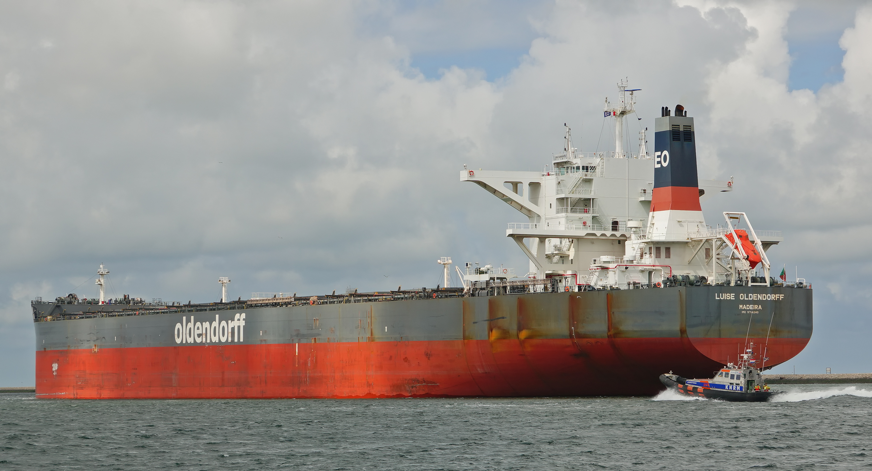 Calandkanaal Europoort 12-8-2017 gezien vanaf DE NIEUWE PRINS